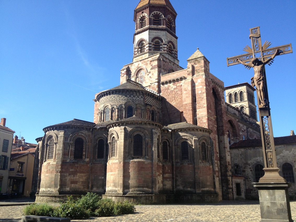 le chevet de Saint-Julien de Brioude